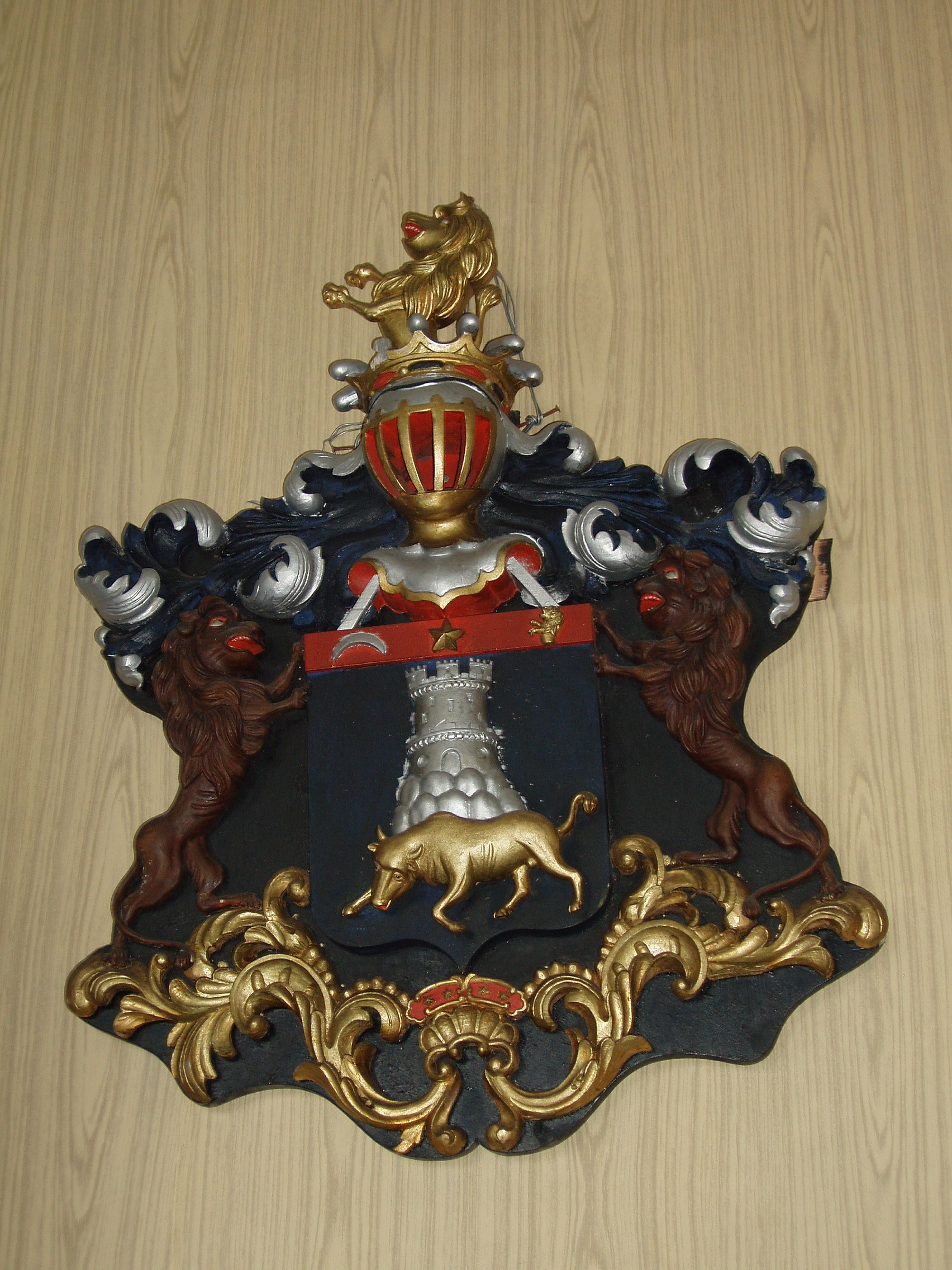 Vapp, 19.saj. (puit, polükroomia).